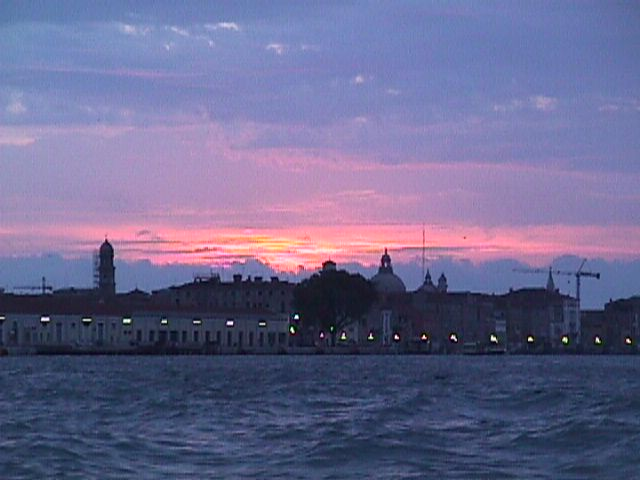 Alba a Venezia - Foto di Giovanni Dall'Orto. Dawn in Venice - Picture by Giovanni Dall'Orto.